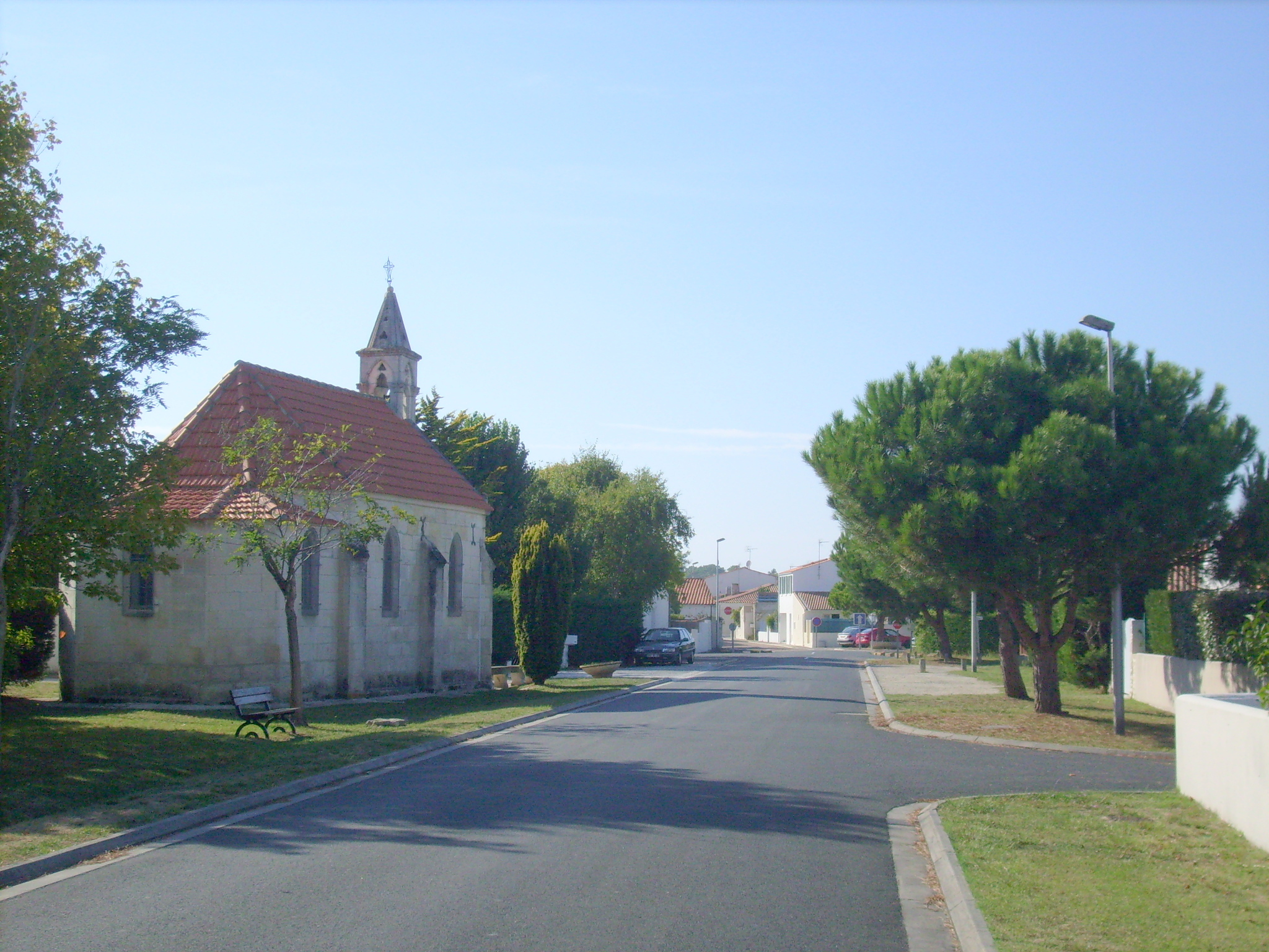 Le centre-bourg de Grand-Village-Plage et l'église Saint-Joseph